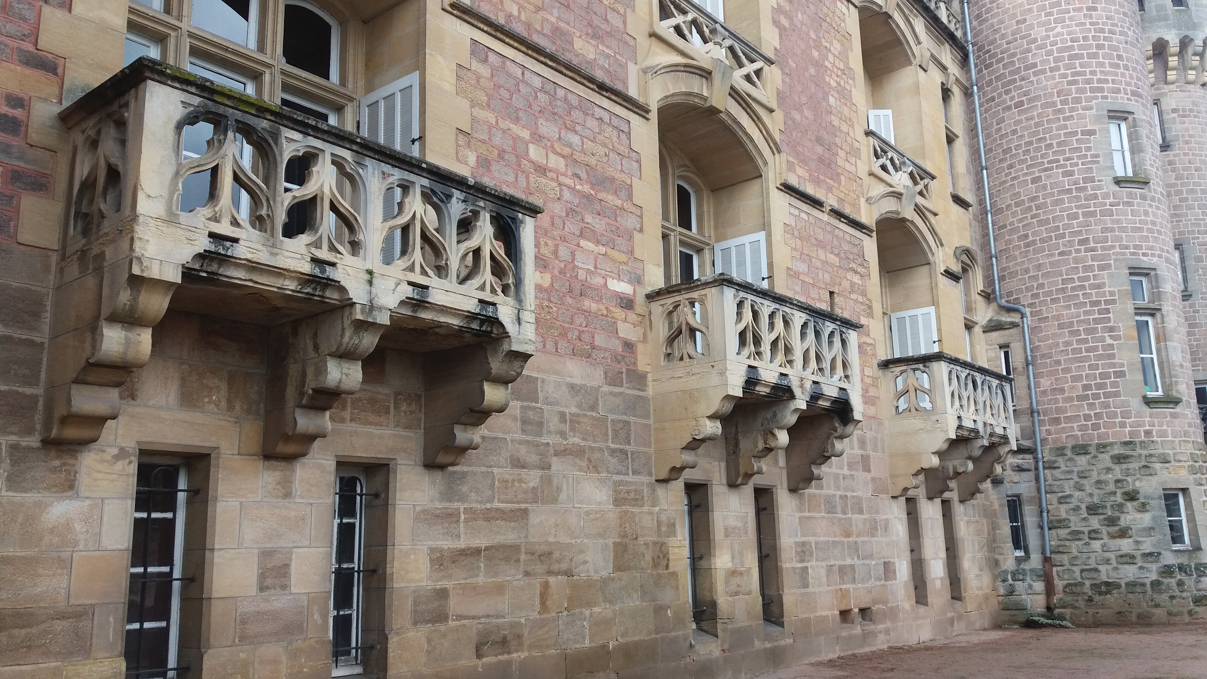 Balcons.